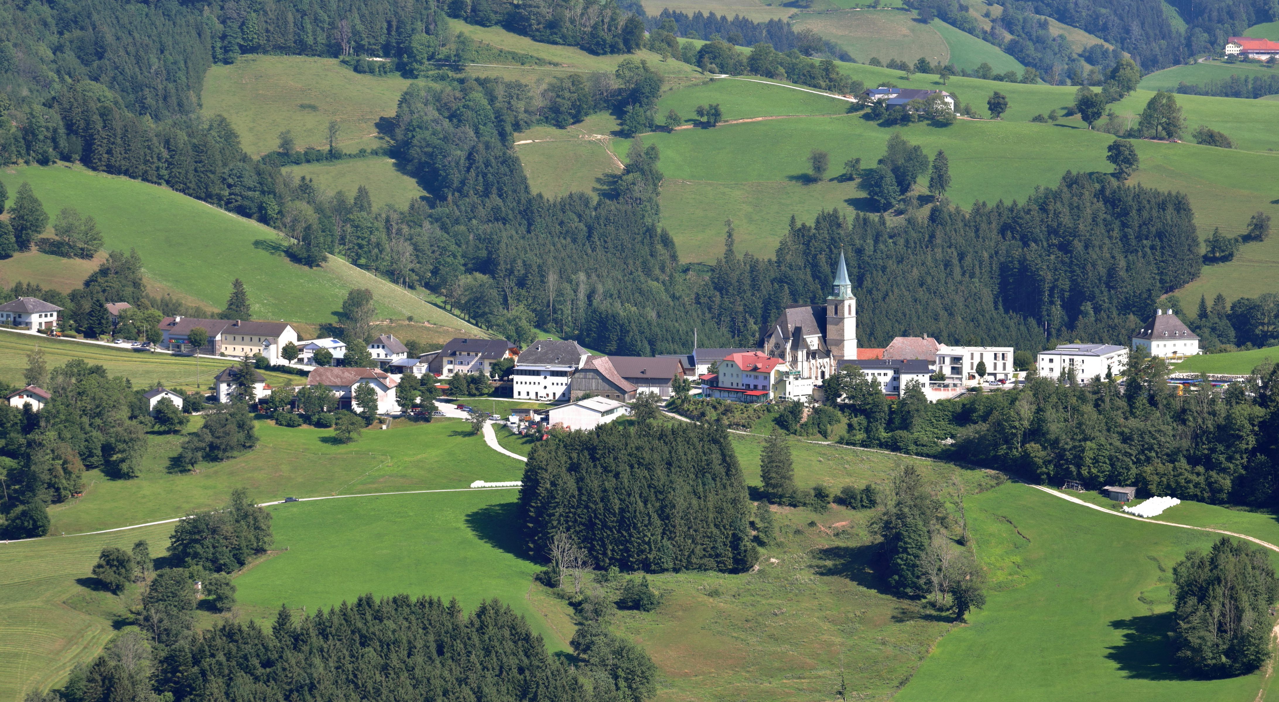 Nordwestansicht des oberösterreichischen Dorfes Maria Neustift. Standort ist der Glasenberg in Buchschachen, ein Ortsteil der Gemeinde Maria Neustift.